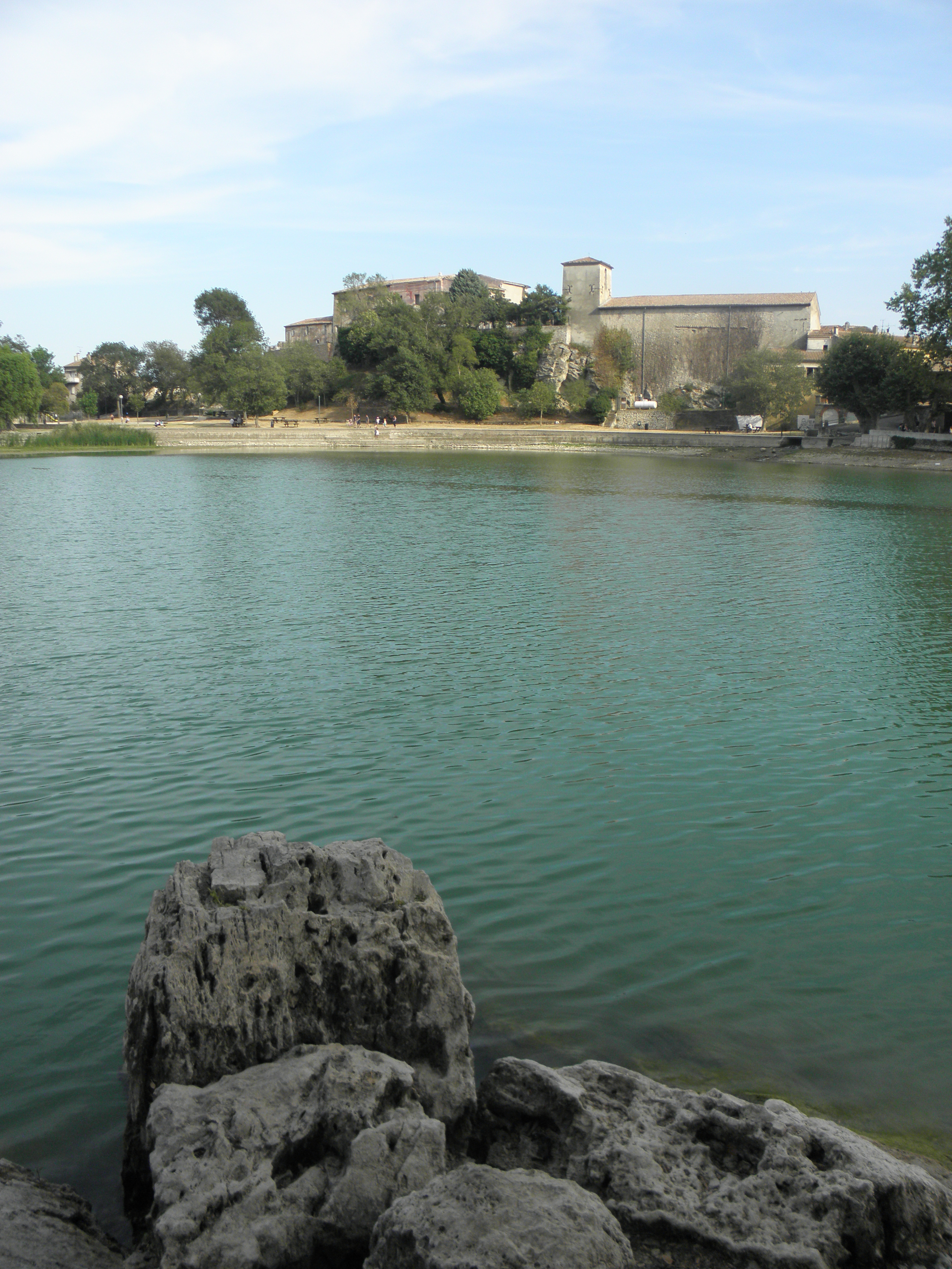 Besse-sur-Issole Vue du village et du lac.